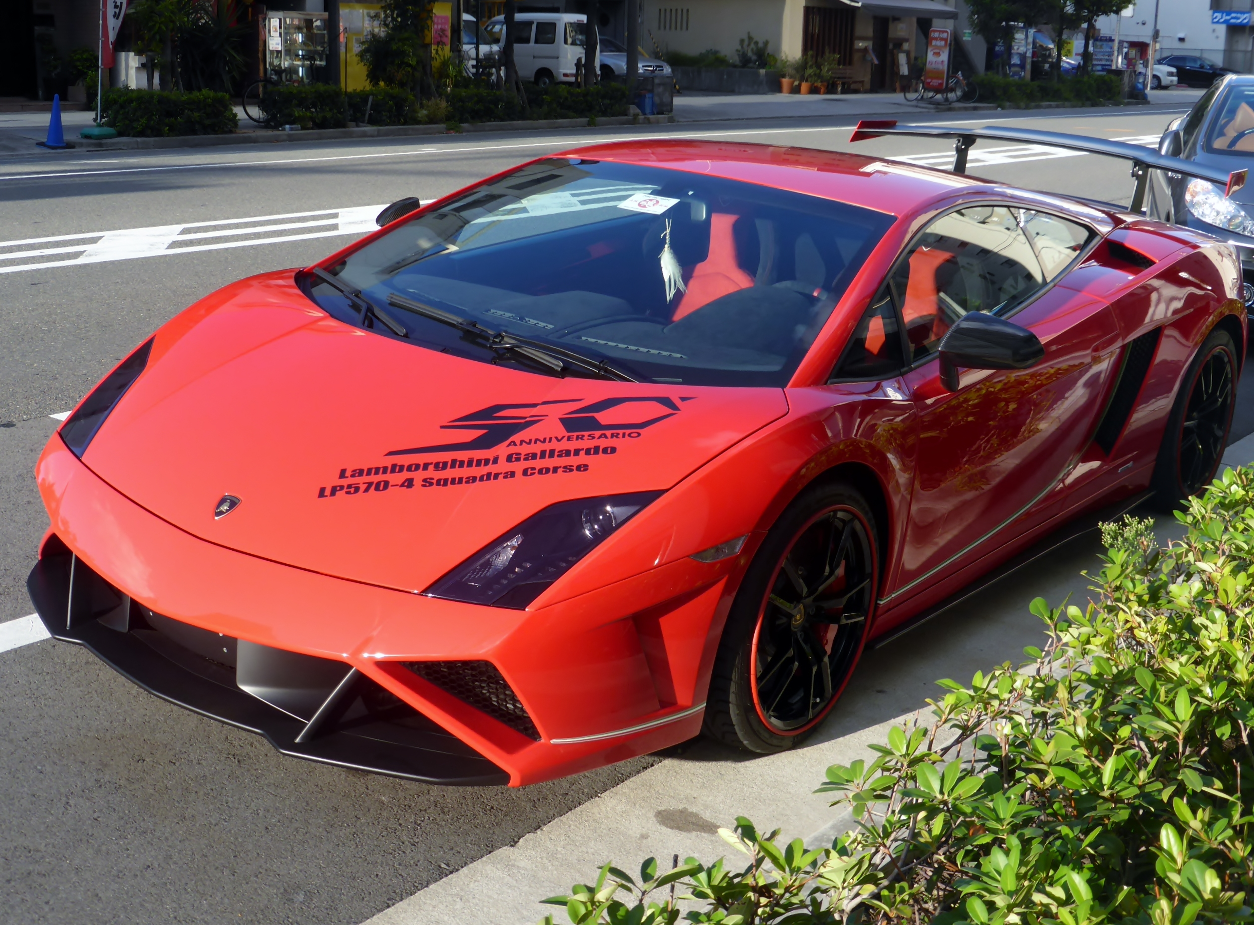 ランボルギーニ・ガヤルドLP570-4スクアドラコルセをフロントから撮影。